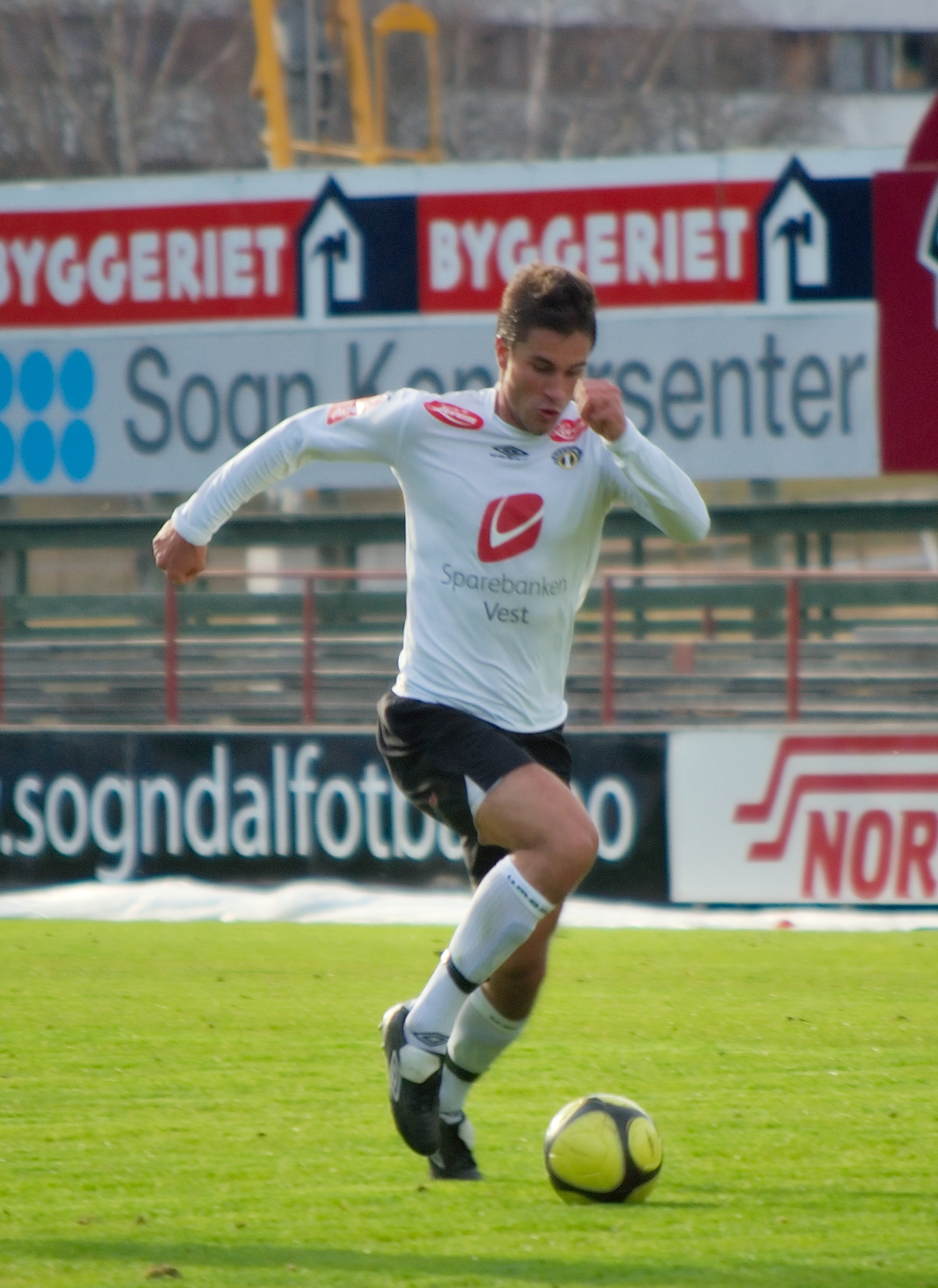 Valtter Laaksonen